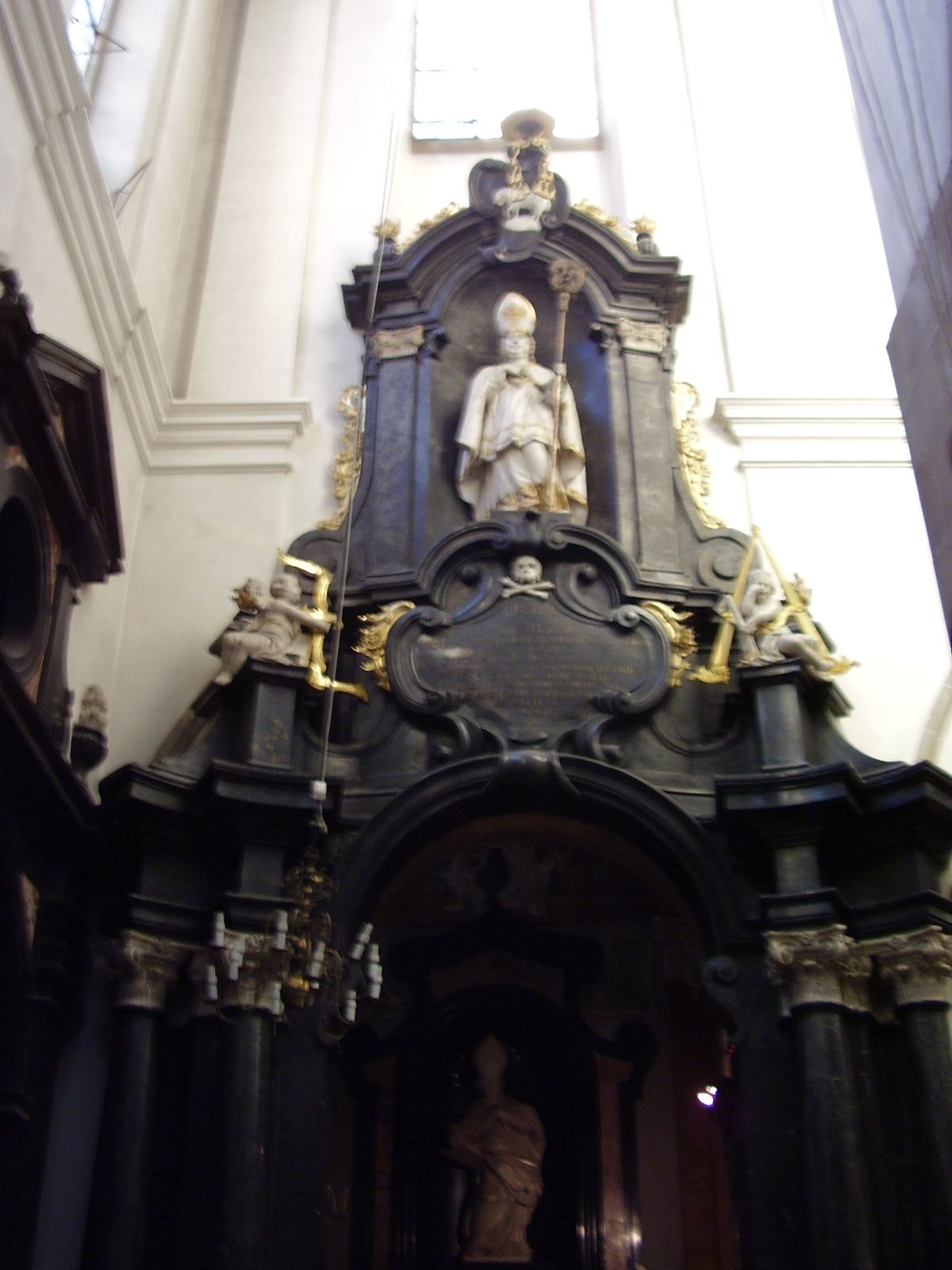 Krakow